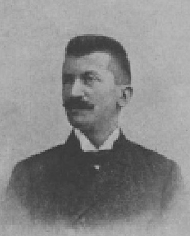 Ante Dulibić (1867-1935), rakouský právník a politik